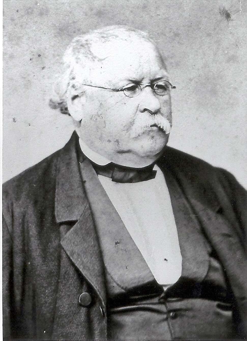 Photo - Carl von Paur